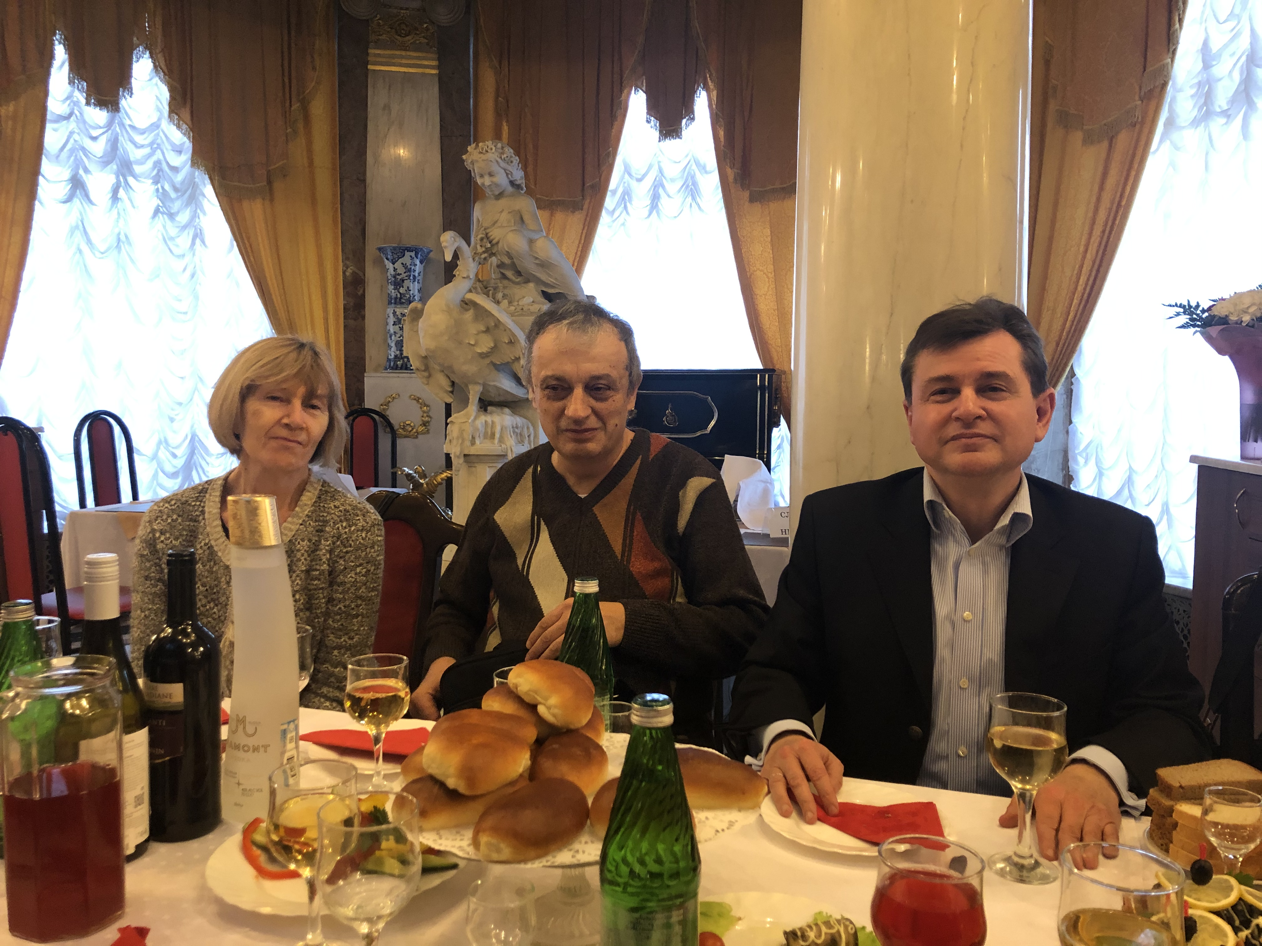 Владимир Боксер и Илья Заславский -тридцать лет спустя.Слева-Галия Боксер.Организатор Демроссии приехал с женой на юбилей Заславского в Центральный Дом ученых на Пречистенке. 2020г